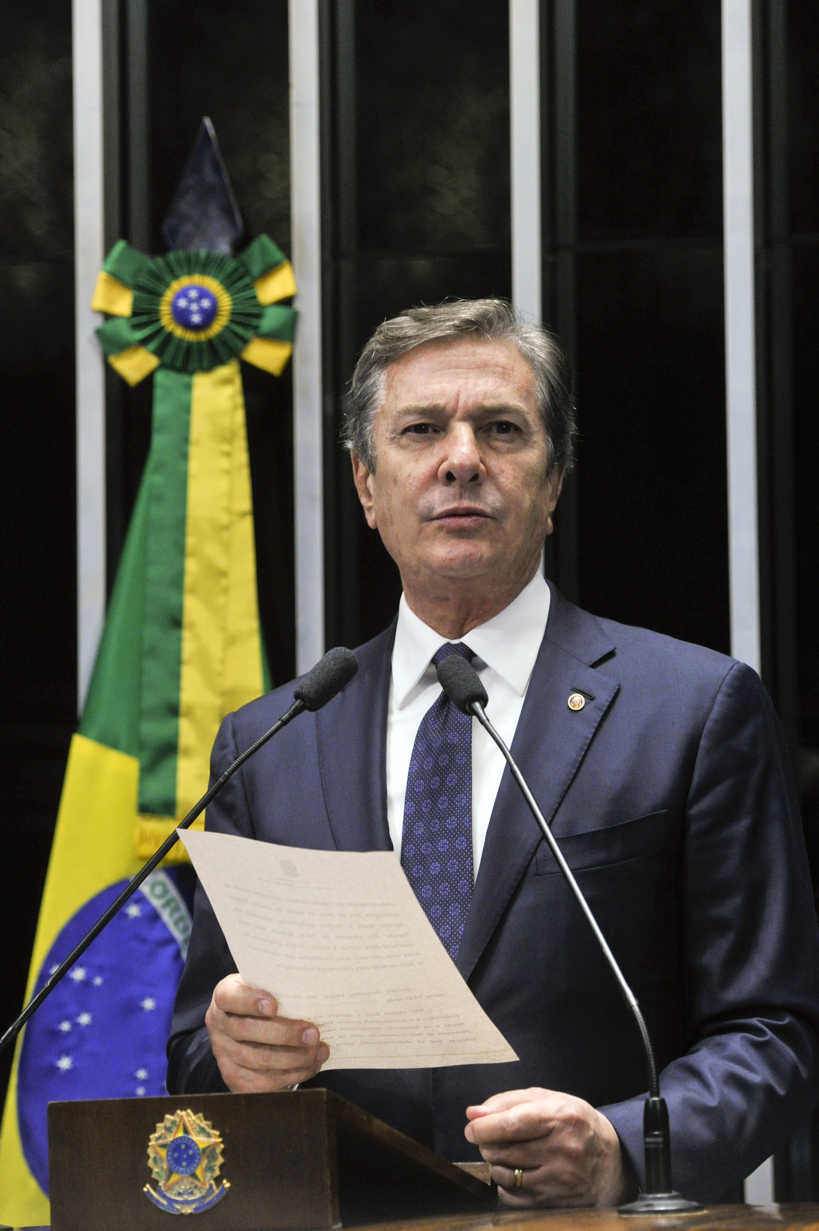 Plenário do Congresso Nacional durante sessão solene destinada a homenagear os 61 anos da morte de Getúlio Vargas. Em discurso, senador Fernando Collor (PTB-AL). Foto: Geraldo Magela/Agência Senado